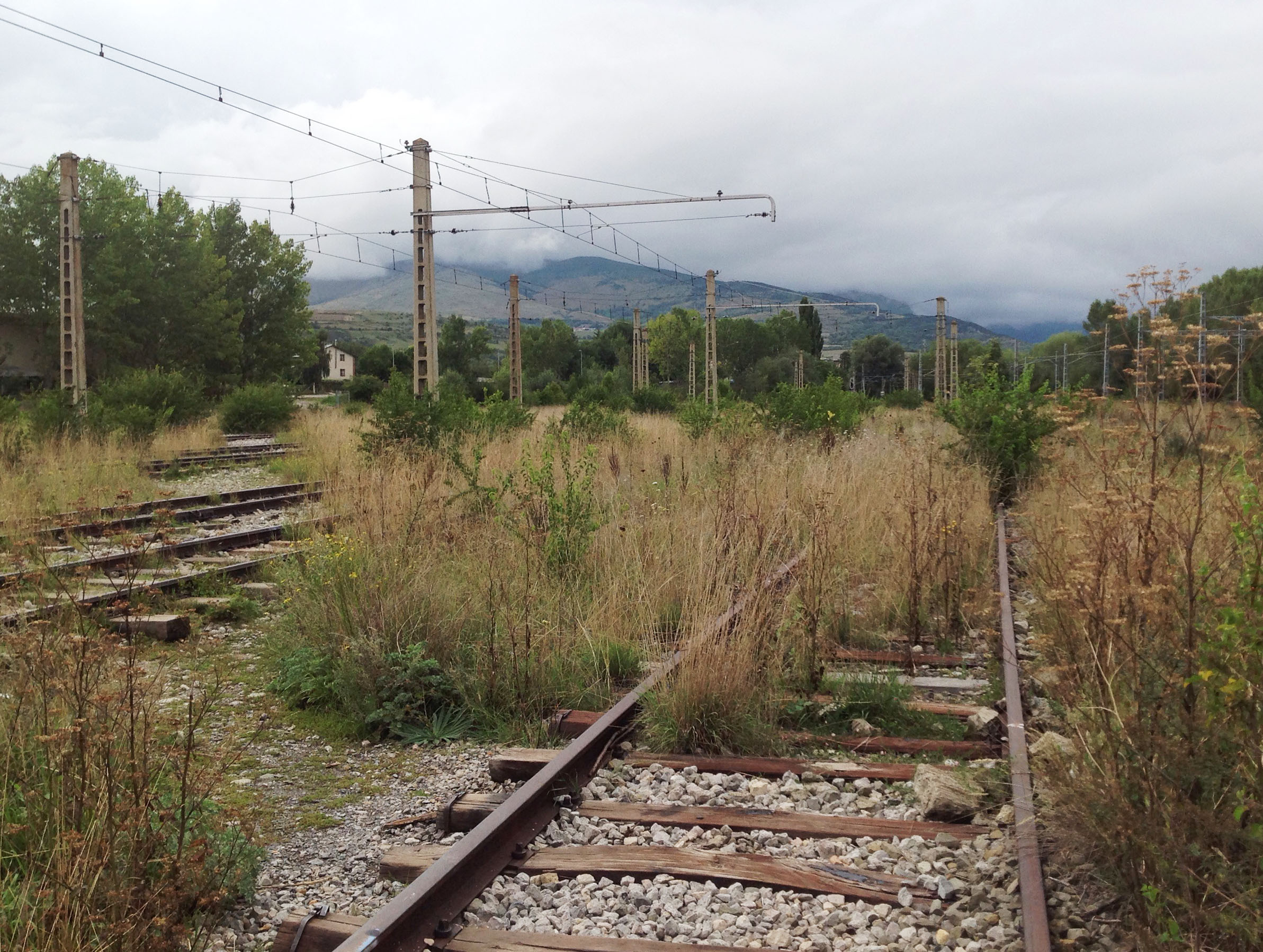 Estat vies a estació Puigcerdà 2015